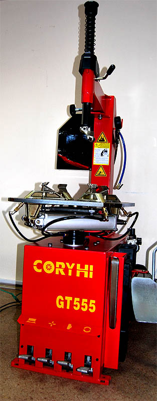 Шиномонтажный станок (tire changer) классической компоновки - с горизонтальным поворотным столом и вертикально опускаемой головкой. Справа от станины видно приспособление для отжима бортов шин, к кулачкам подходят шланги взрывной подкачки.